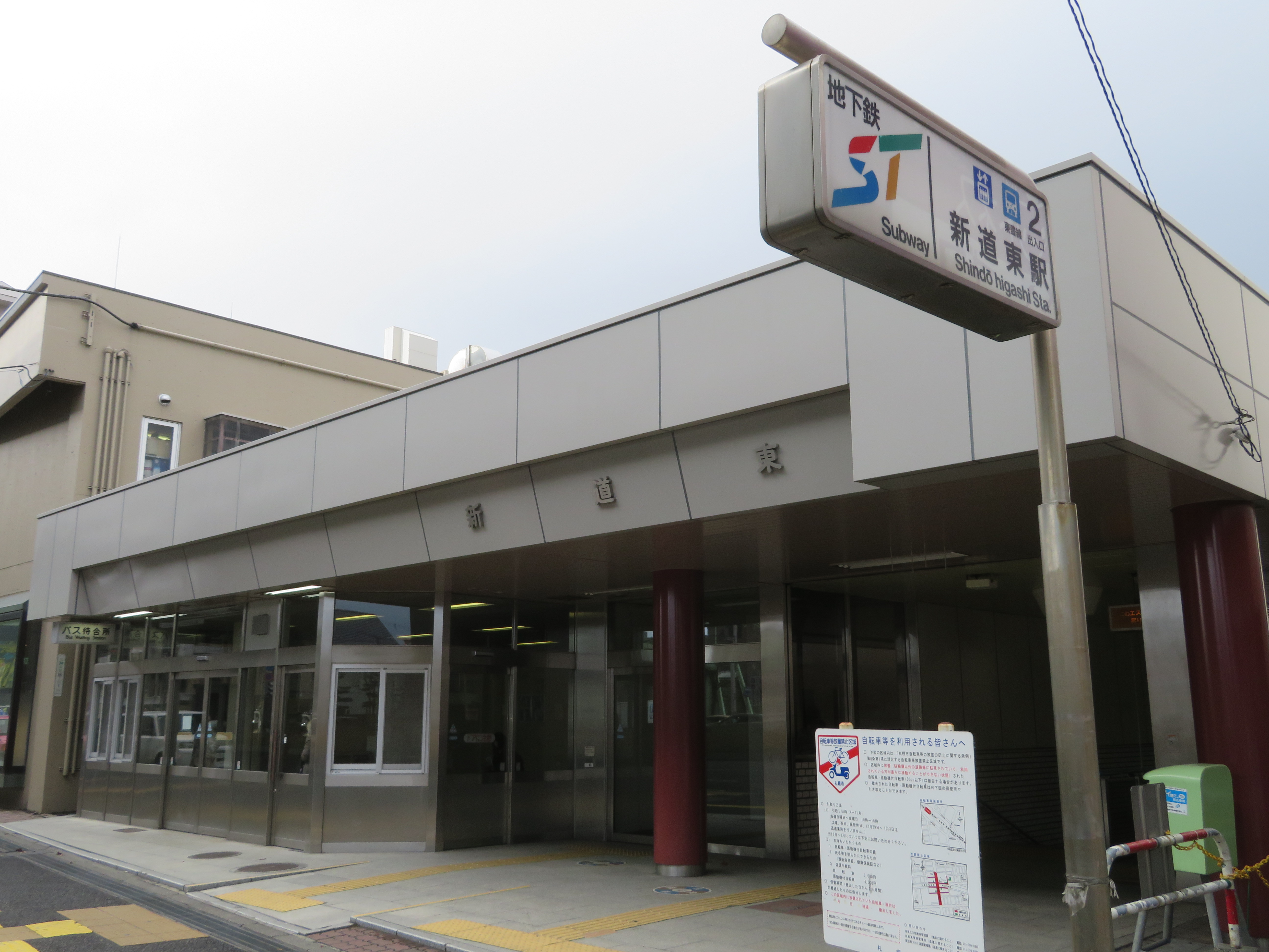 新道東駅2番出入口